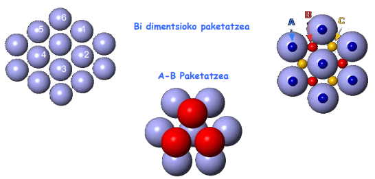 Bi dimentsioko paketatzea